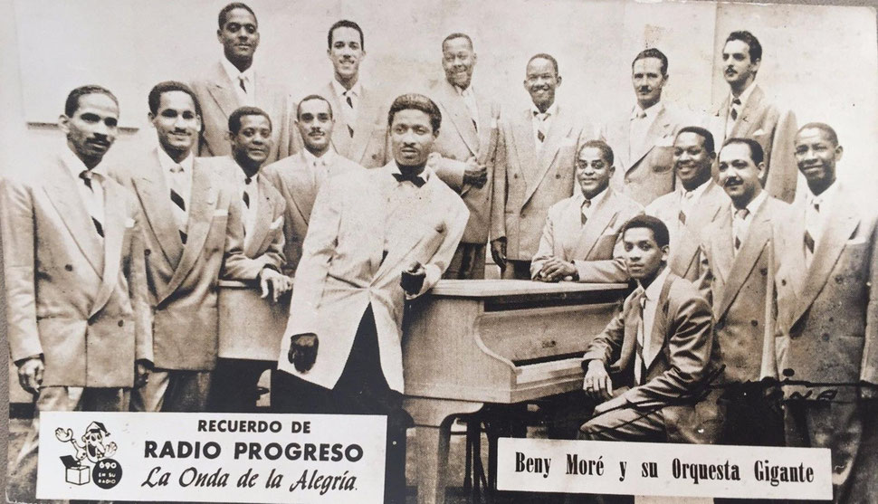 Beny Moré y su Orquesta Gigante at Radio Progreso, Havana, Cuba. Promotional picture.